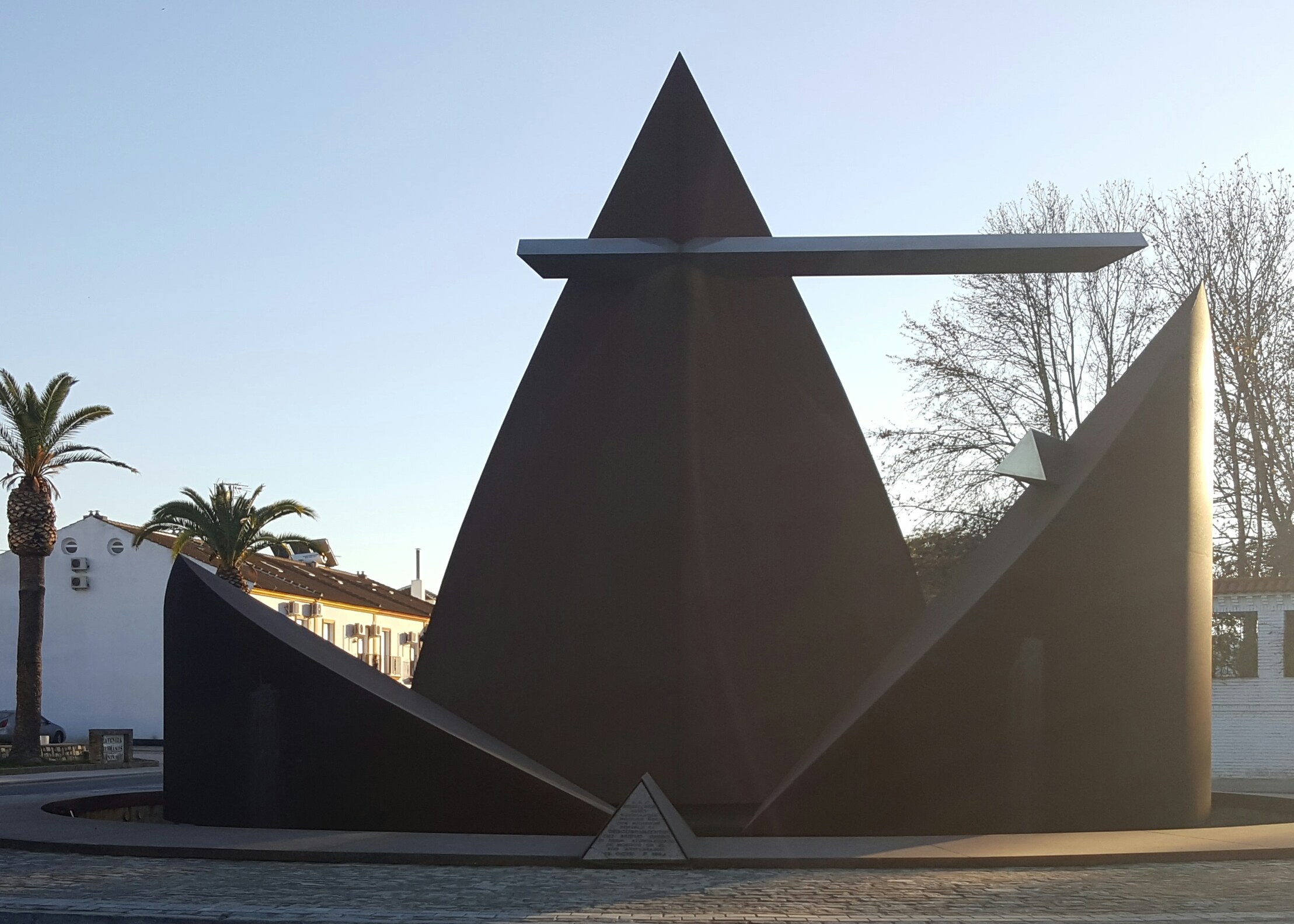 Monumento a los Hermanos Niño, Pedro Alonso y Juan Niño. Moguer, provincia de Huelva, Andalucía, España.